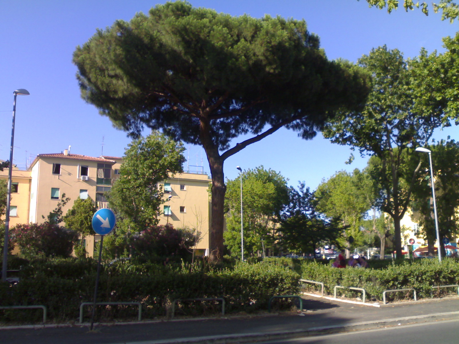 Pinus pinea in piazza Segantini ad Acilia, Roma